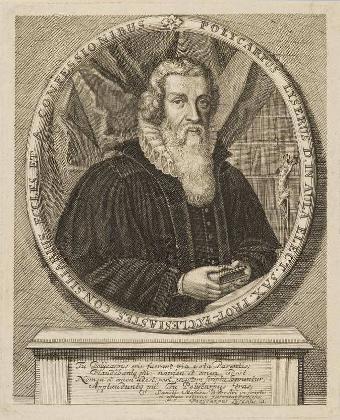 Polycarp Leyser II.